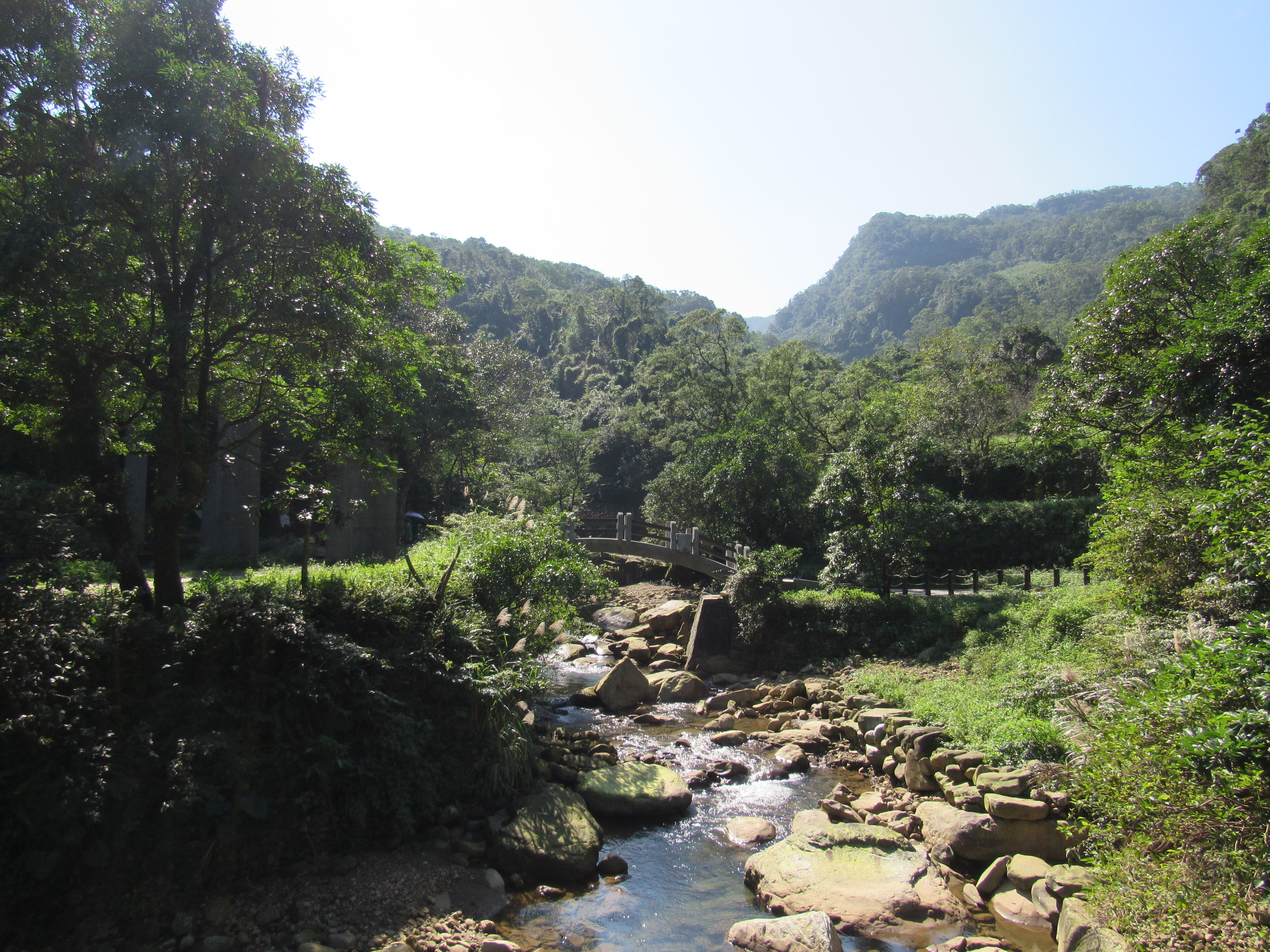 中文（台灣）: 暖東峽谷溪景